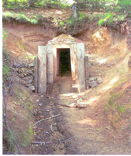 Entrée de la mine dite de Grès.